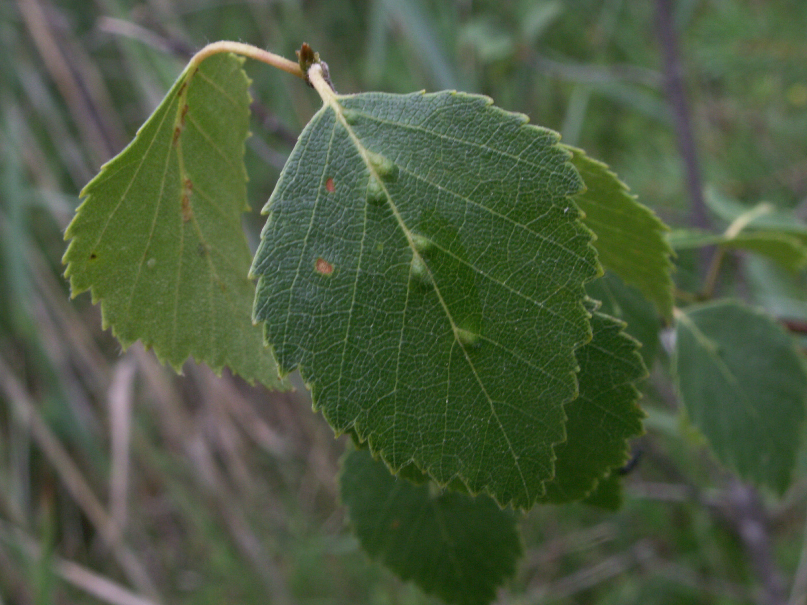 Betula pubescens Blaetter